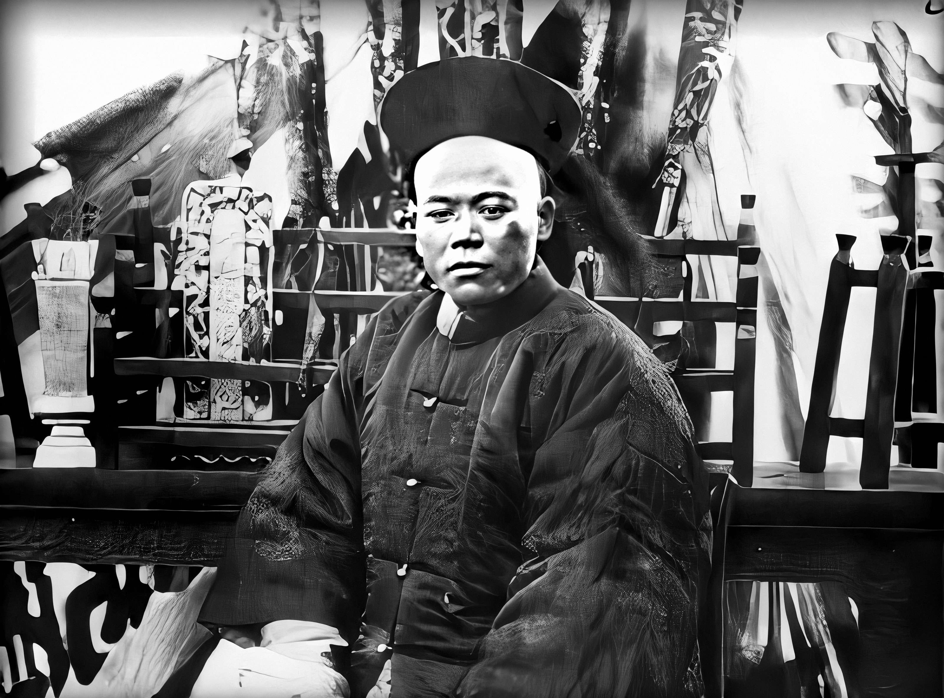 程学启降清后所摄。